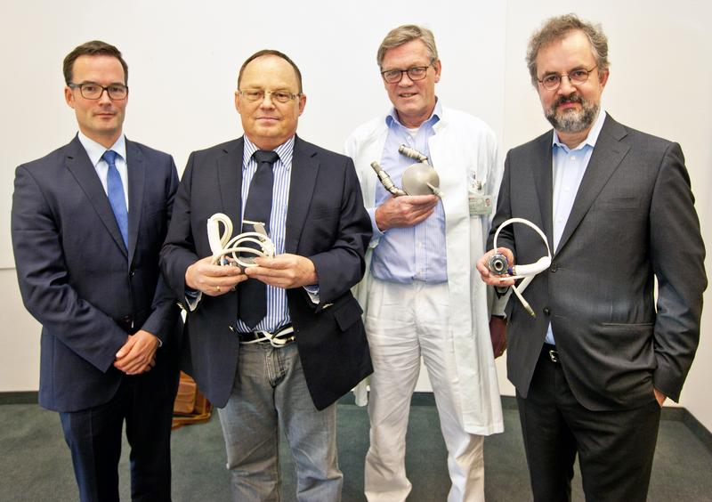 PD Dr. J.D. Schmitto, Uwe S., Prof. Dr. Dr. hc. A. Haverich, Prof. Dr. M. Strüber